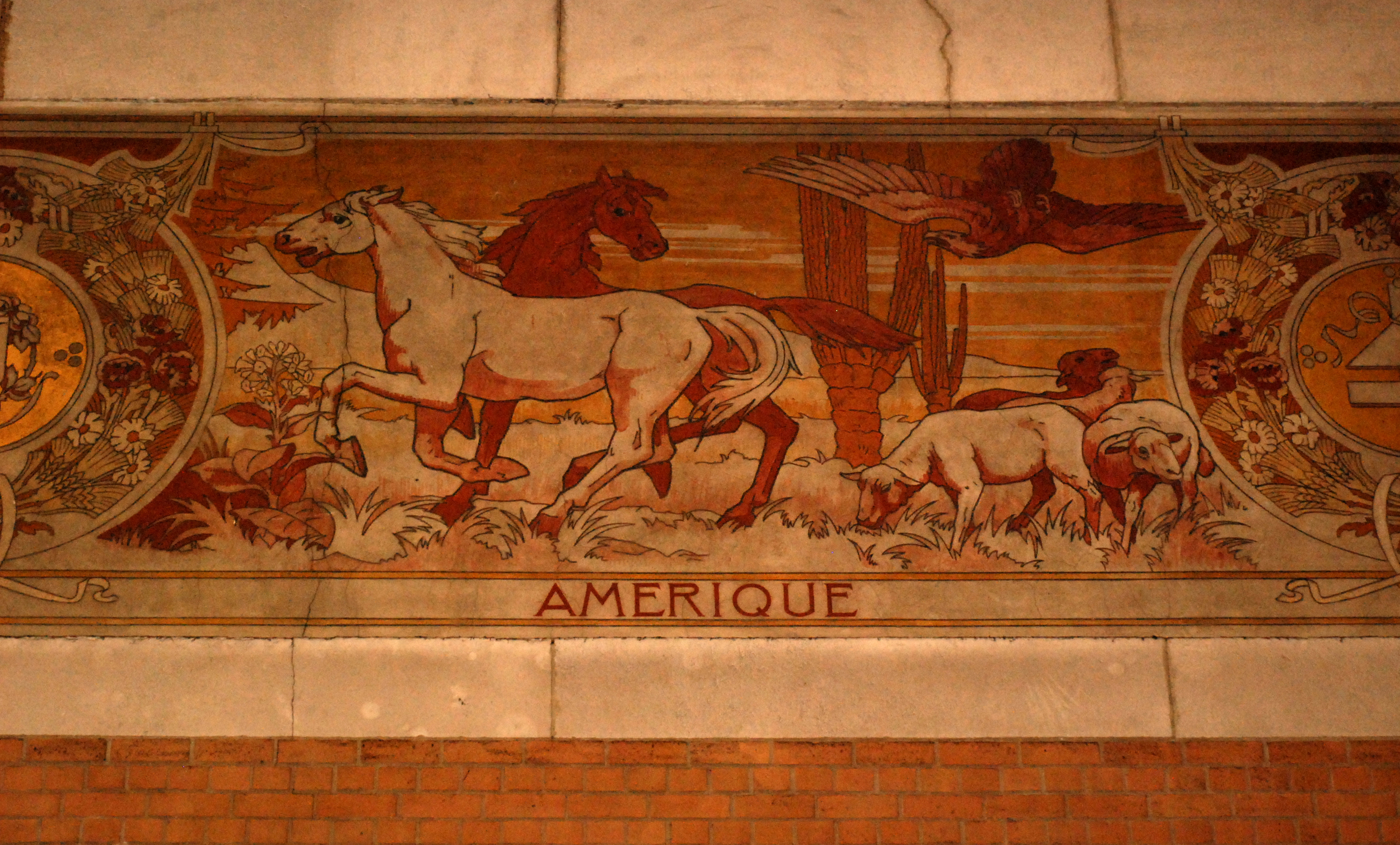 Belgique - Bruxelles - Koekelberg - Ancienne école communale des filles - sgraffite d'Adolphe Crespin (1909)